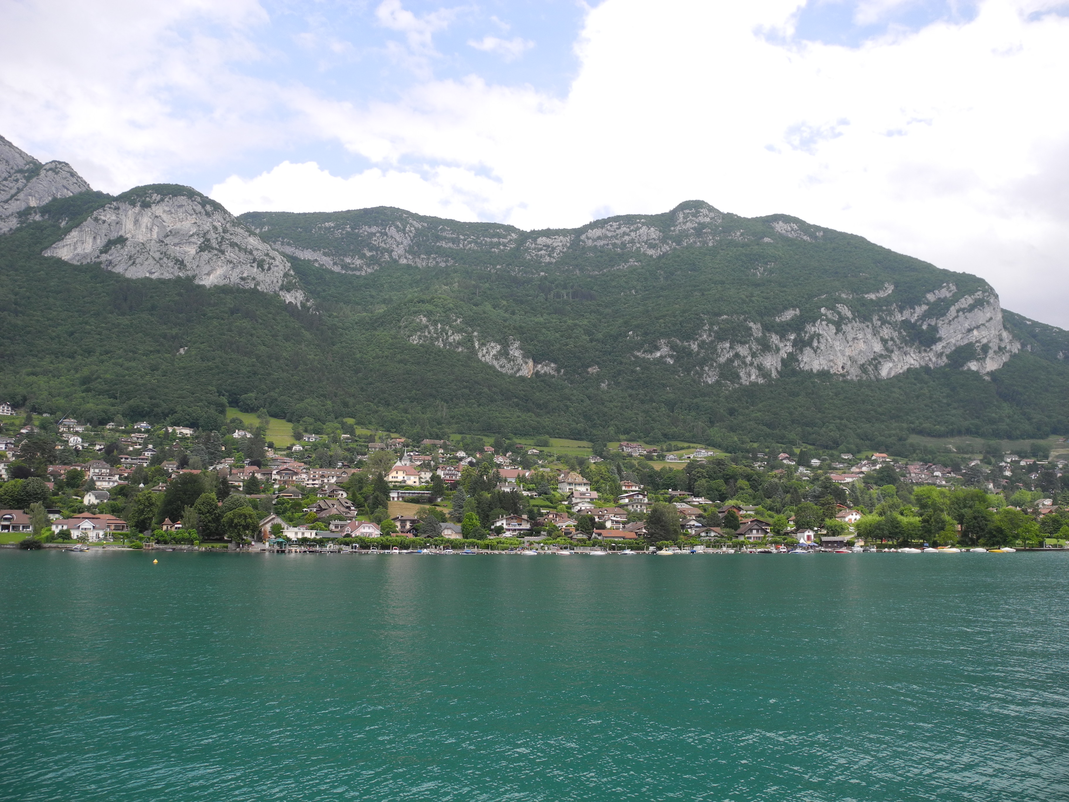 Veyrier-du-Lac vu depuis le lac d'Annecy